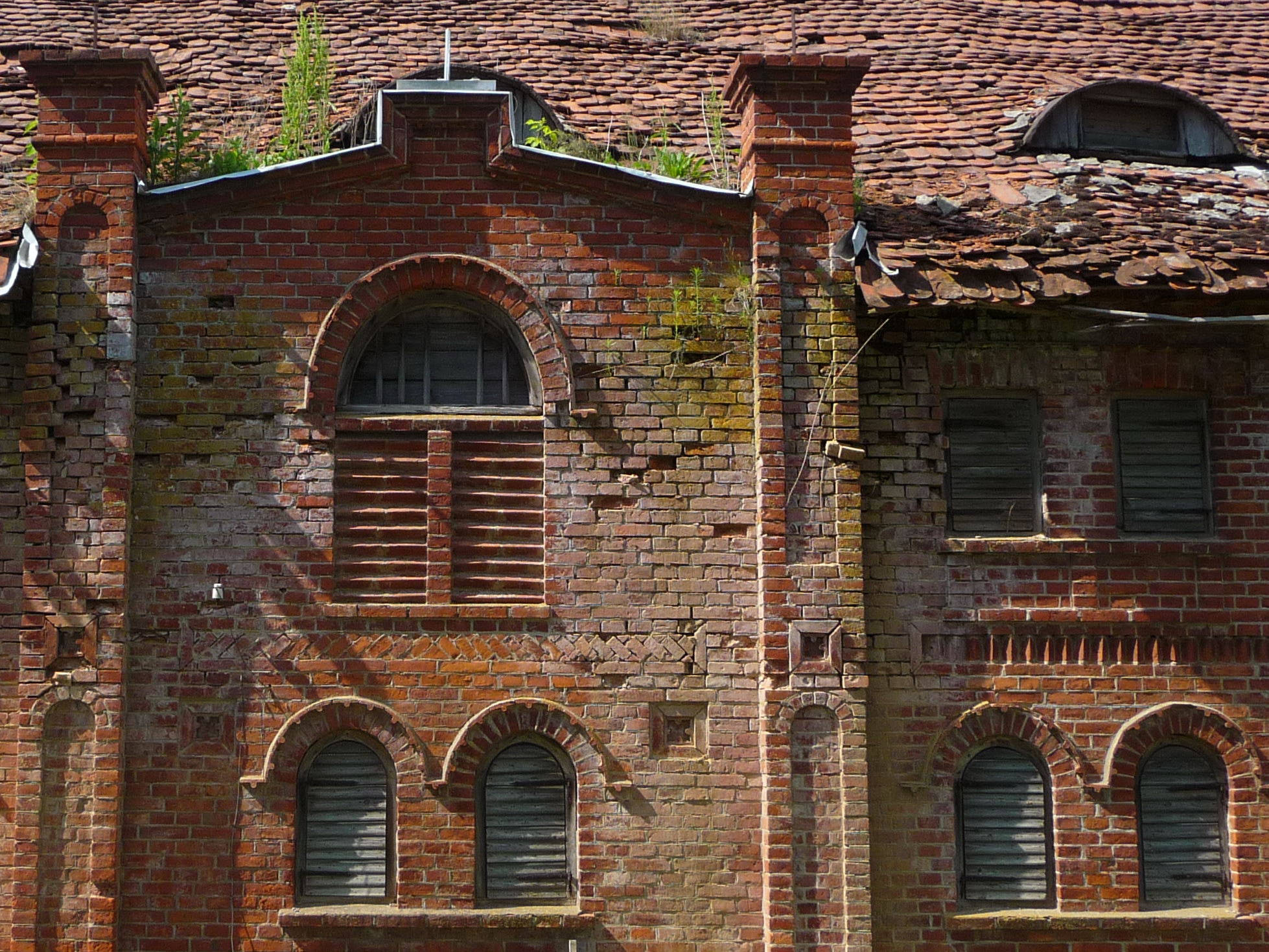 Kidulių dvaro svirno pietinio fasado fragmentas